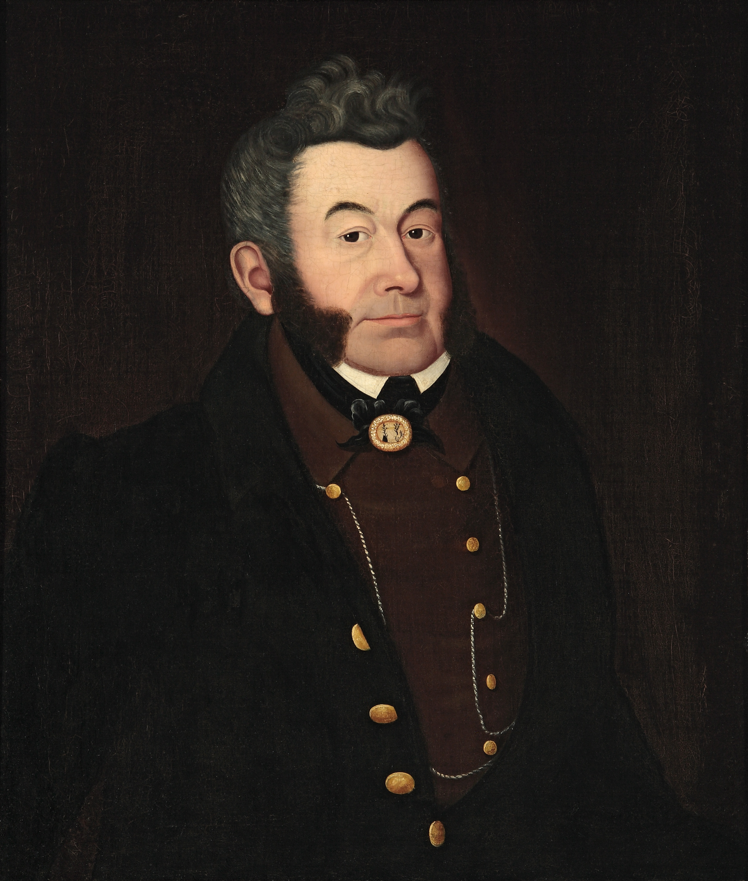 Jean-Baptiste-René Hertel de Rouville (1789-1859)